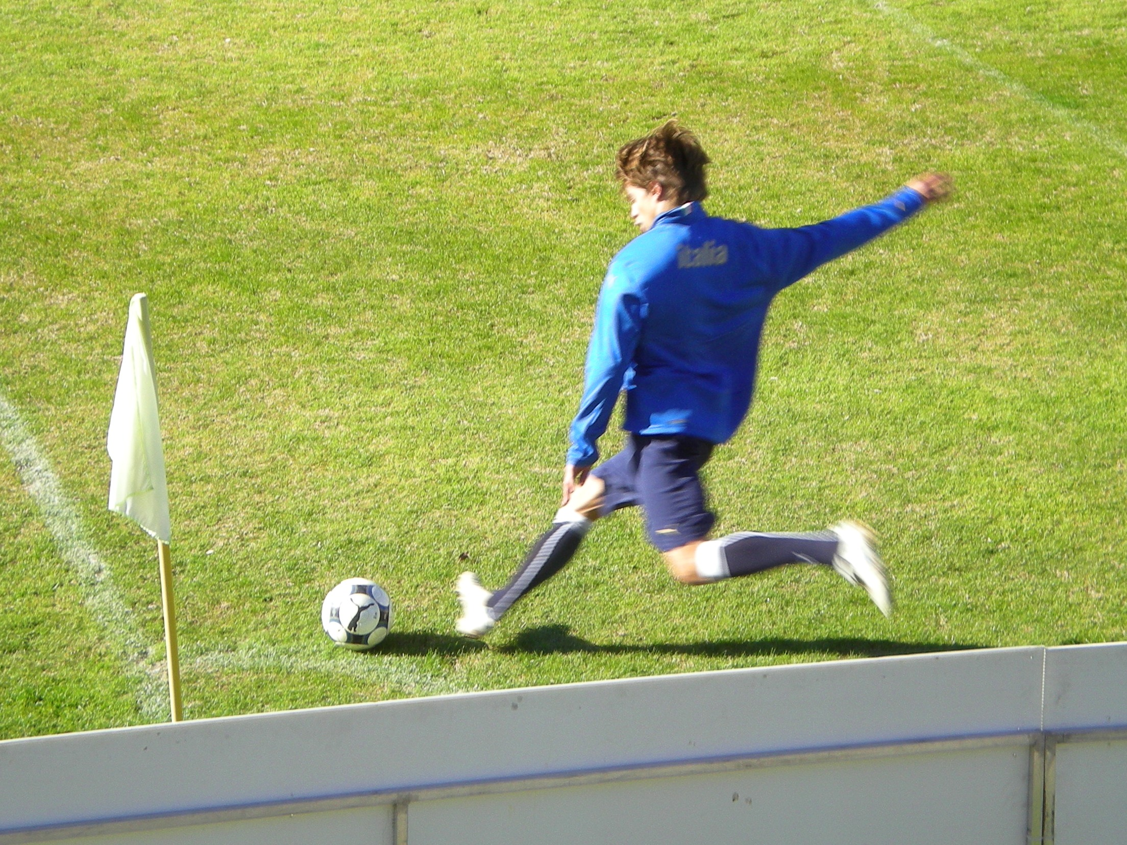 Daniele Galloppa in un allenamento della Nazionale nel novembre 2009 allo stadio Tommaso Fattori dell'Aquila